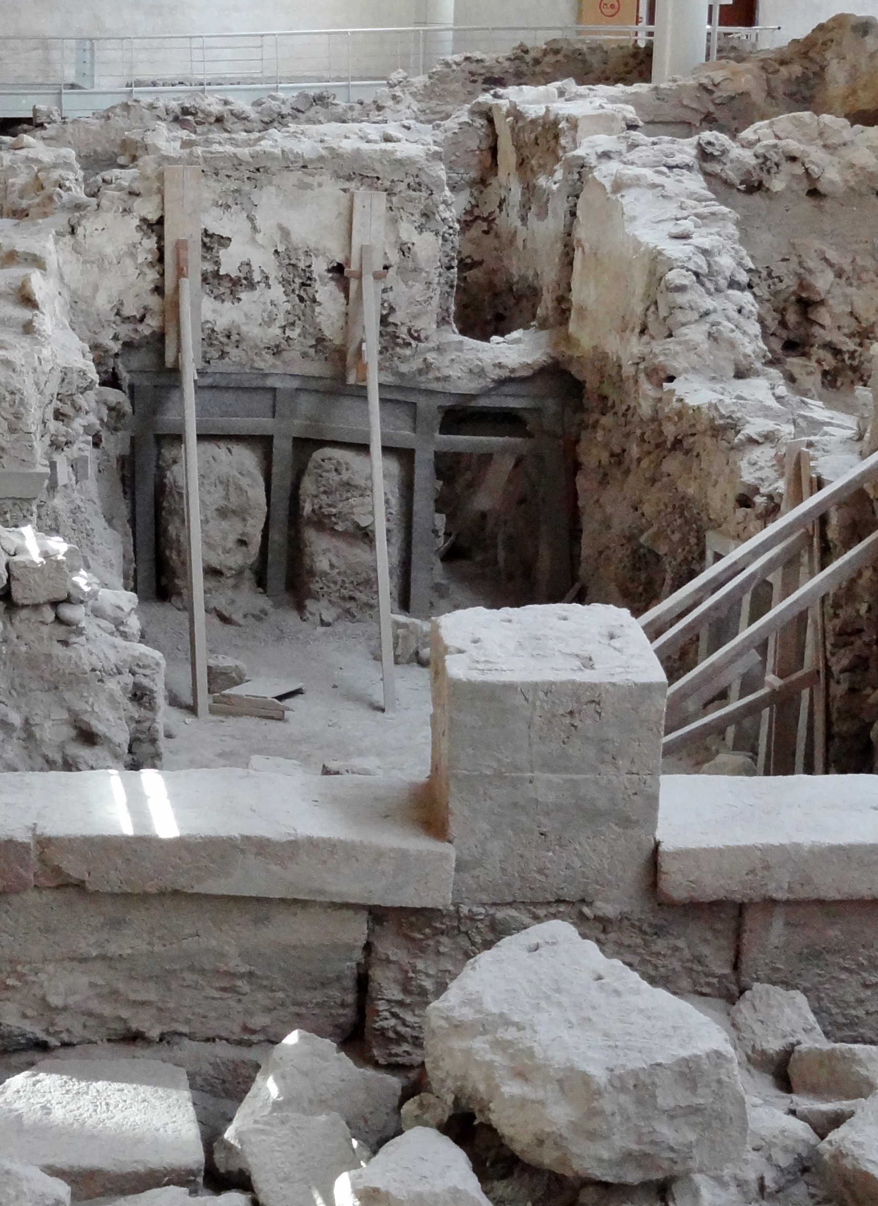 Ausgrabungsstätte von Akrotiri auf Santorin, Kykladen, Griechenland, beschnitten